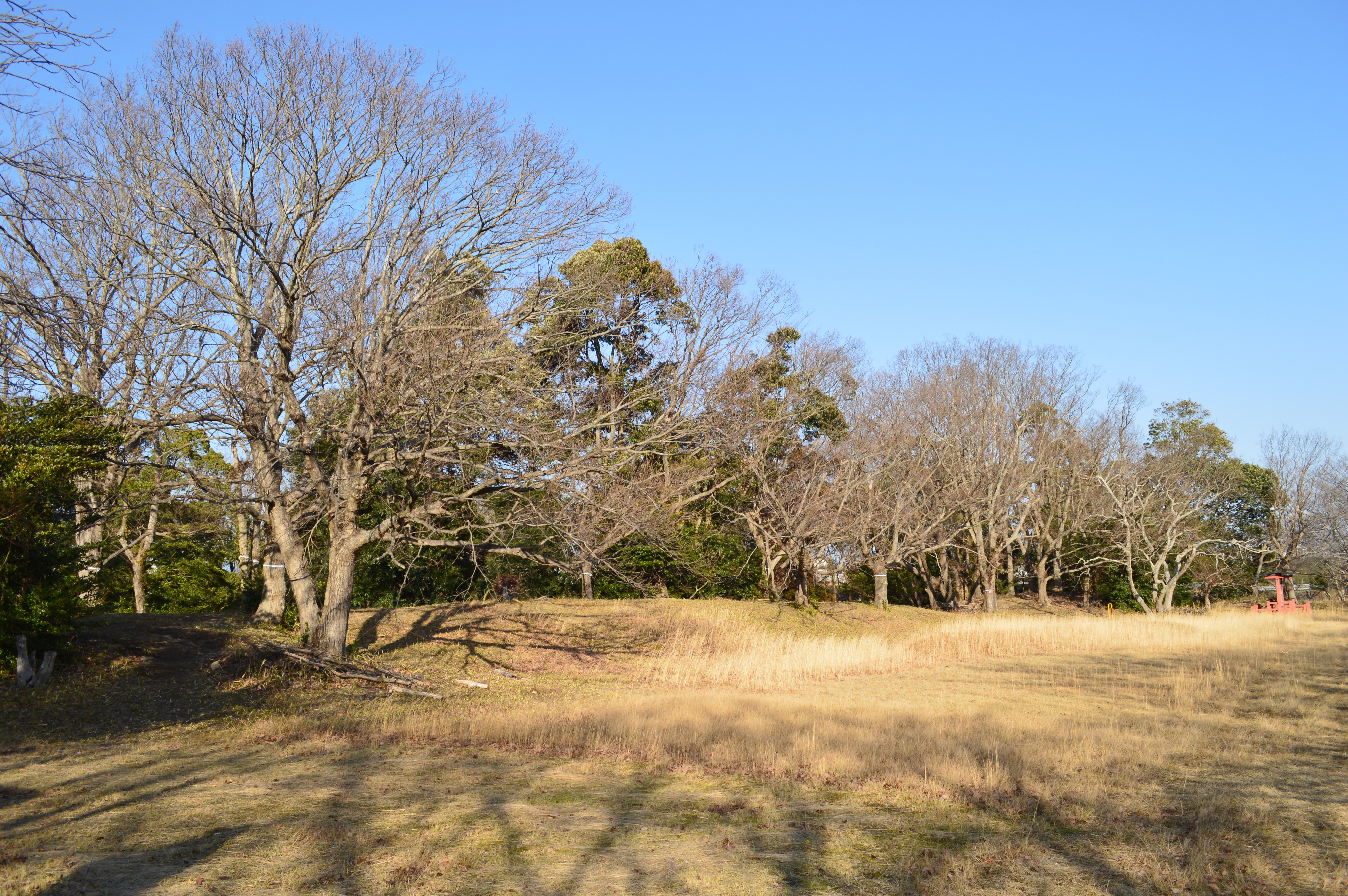 長者屋敷遺跡 (磐田市) 南面全体